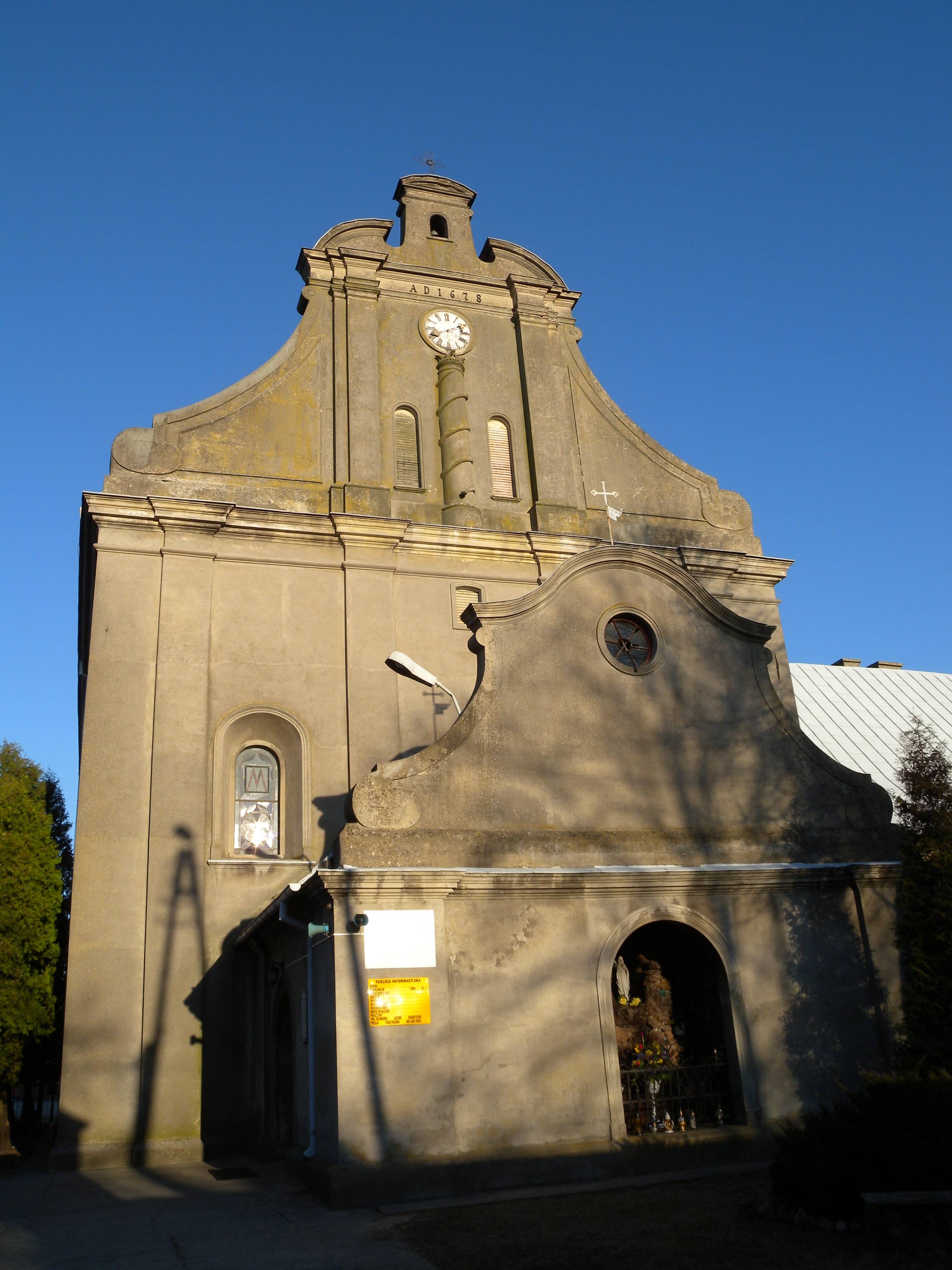 Widawa kościół pw. Podwyższenia Krzyża Świętego